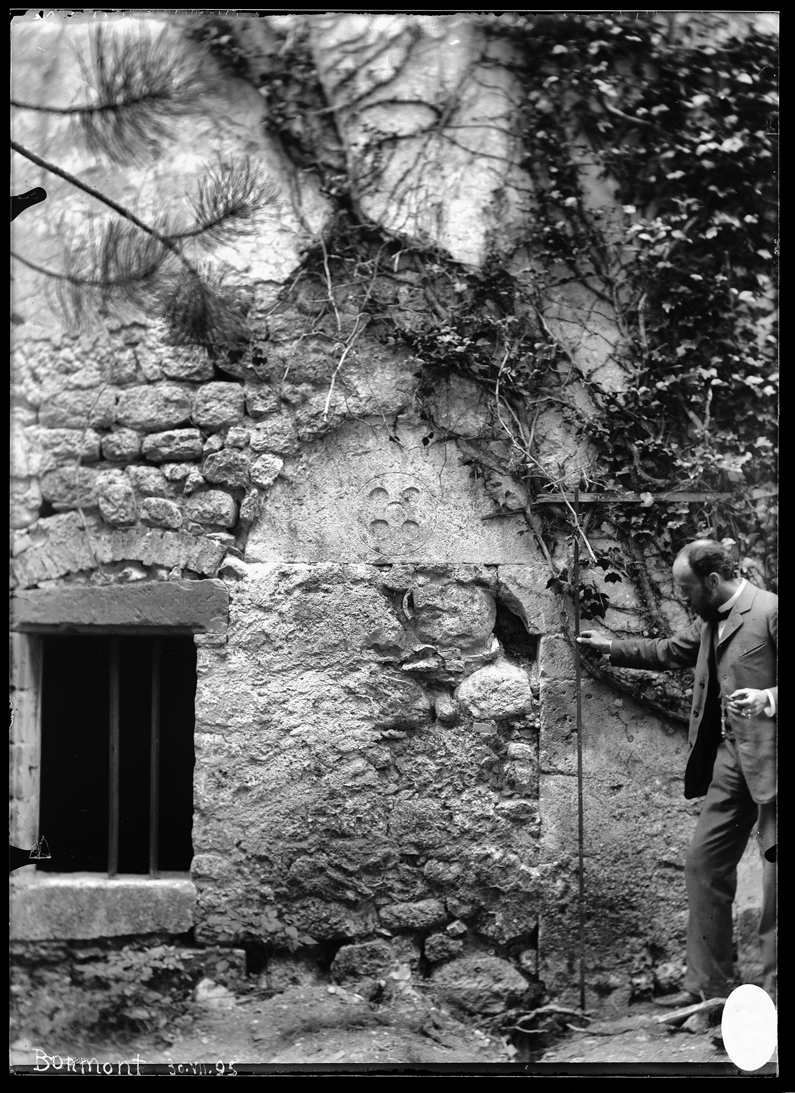 Albert Naef prend les mesures de la fenêtre à droite de l'image